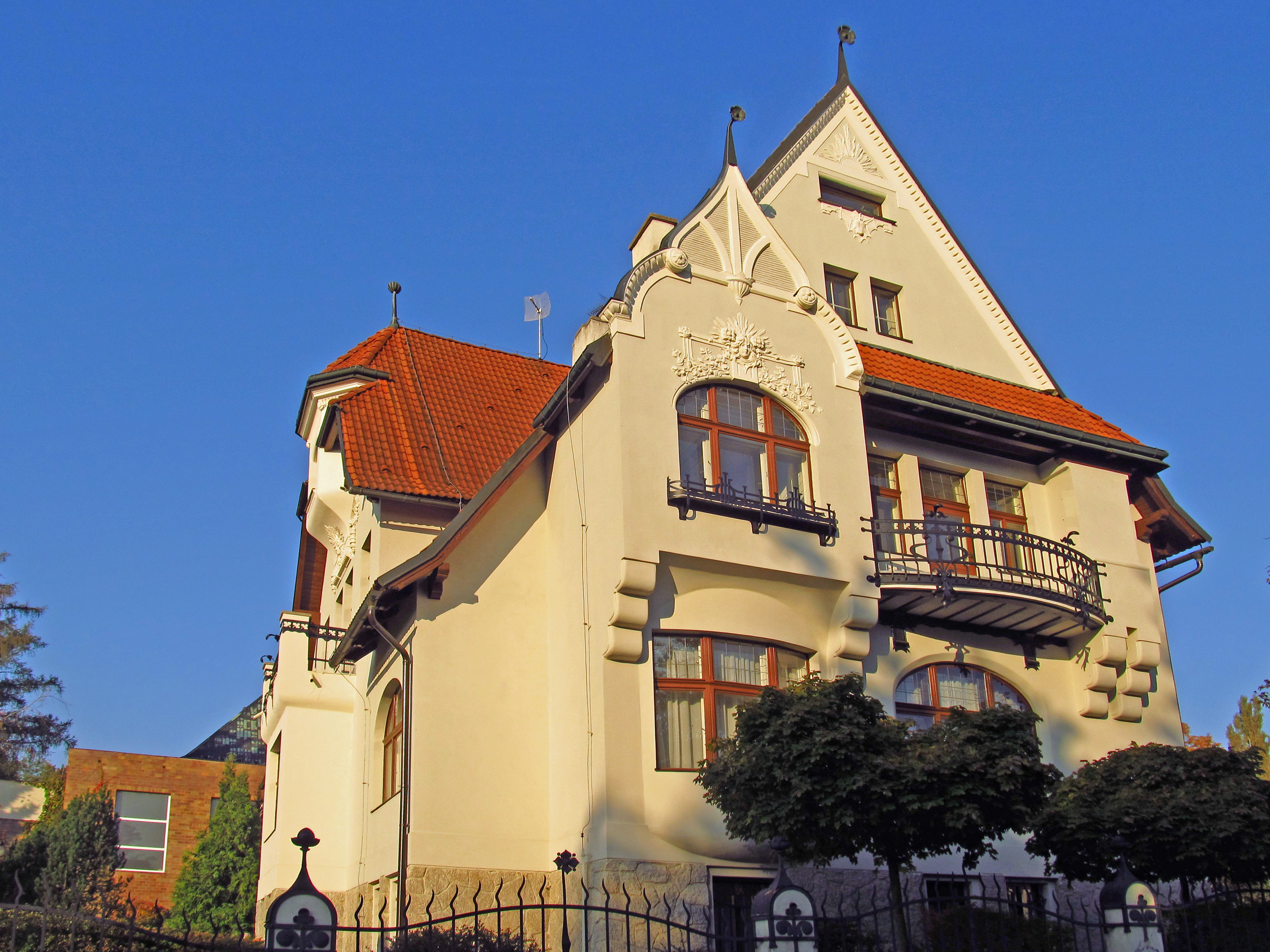 Vila Husova 725/40, Husova 725/40, Klostermannova 725/18, Staré Město, Liberec.